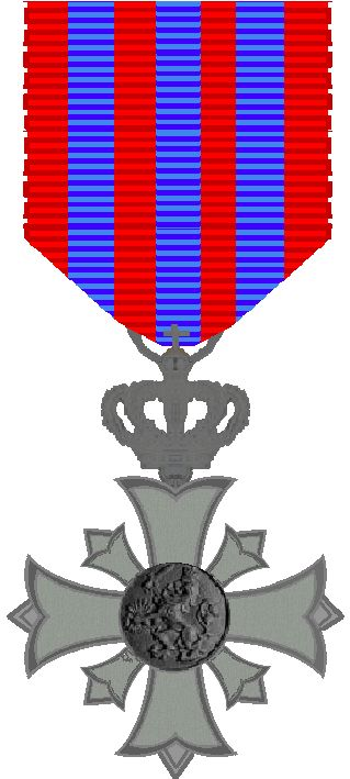 Kruis Militaire Prestatietocht